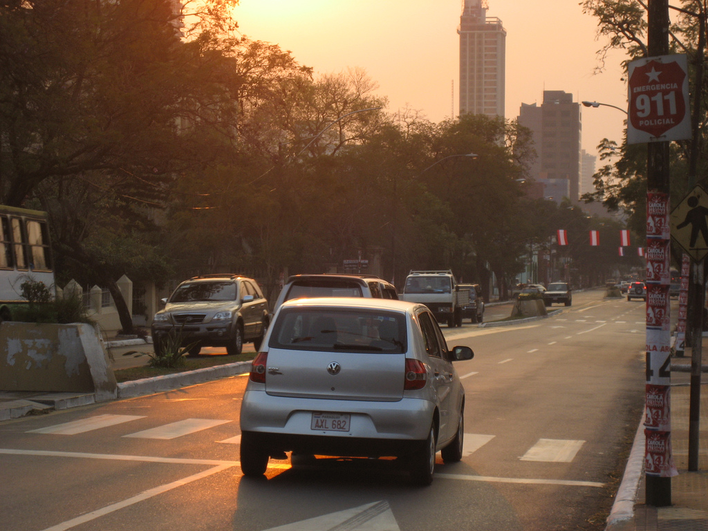 Un hermoso atardecer en la Avenida Mariscal Francisco Solano López de la ciudad de Asunción - Paraguay.